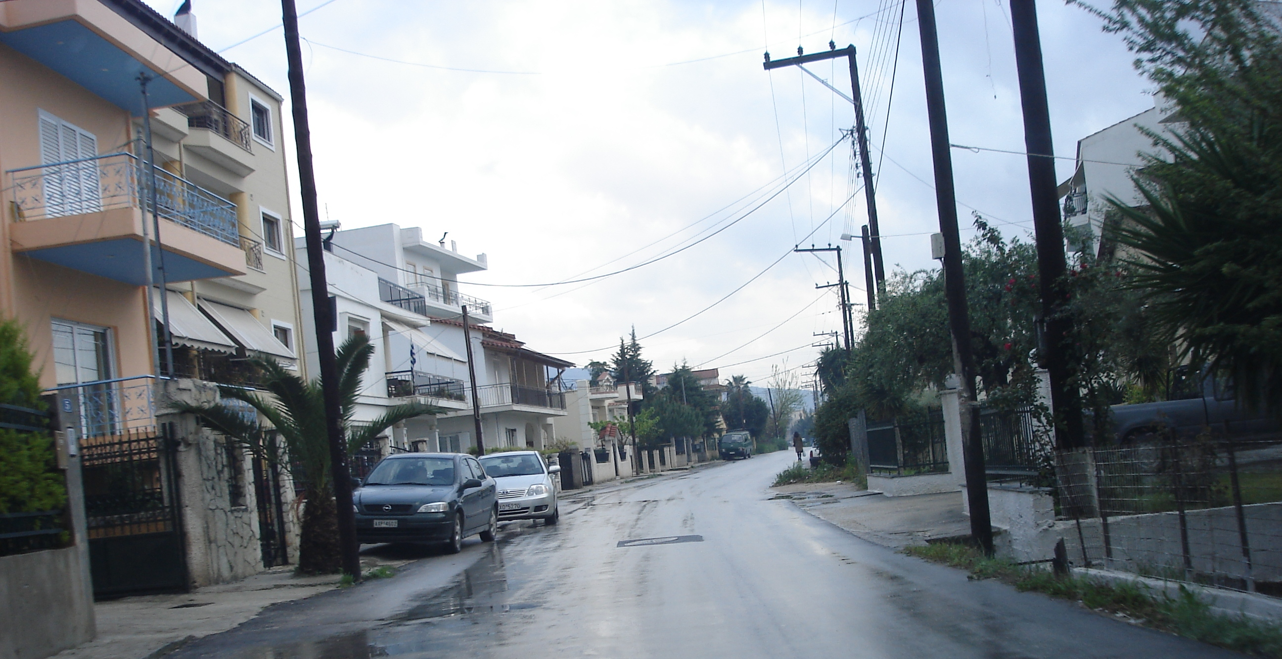 Begoylaki Patra Greece